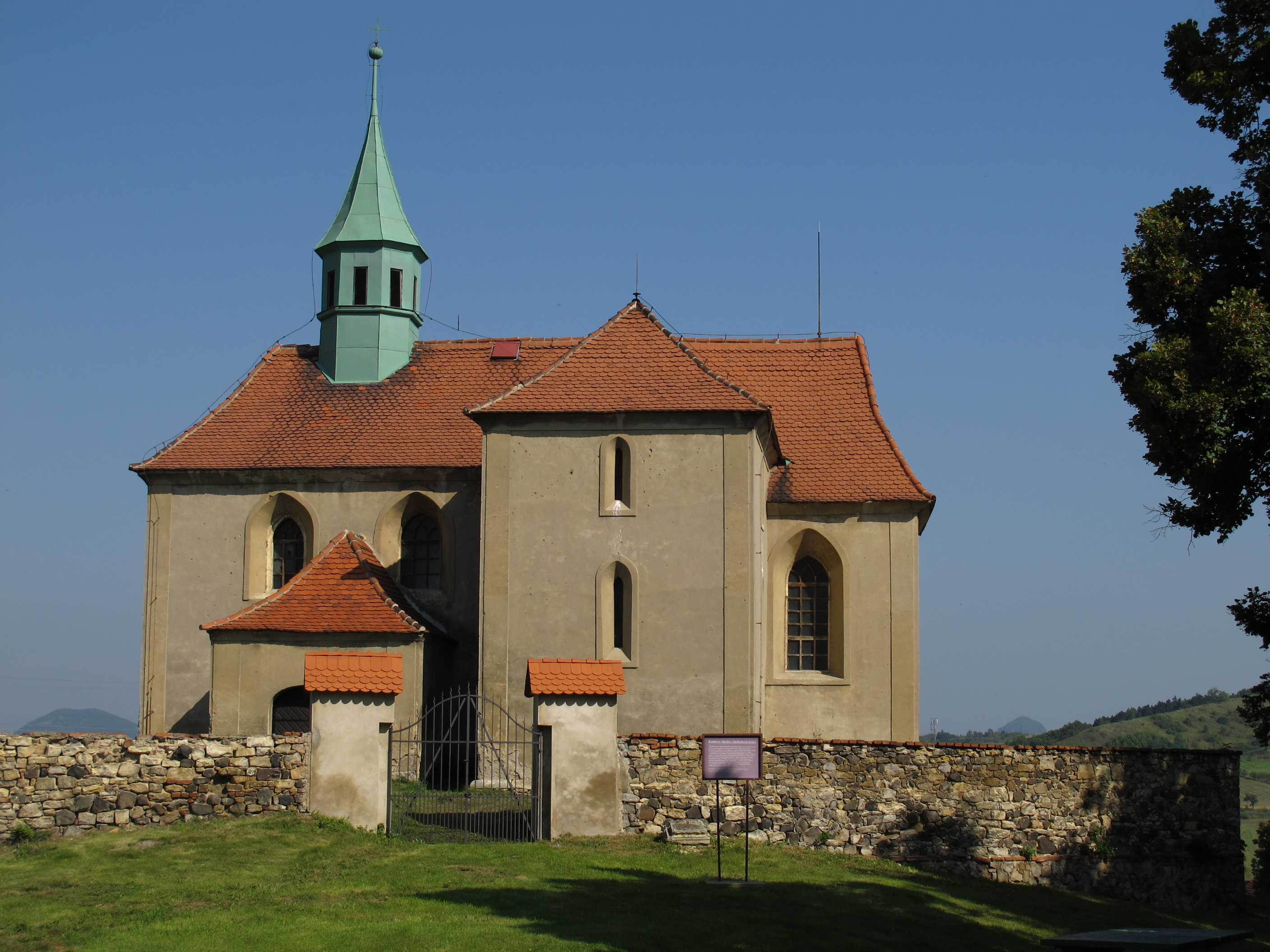 Osada Bedřichův Světec, okres Most - kostel sv. Jakuba Většího